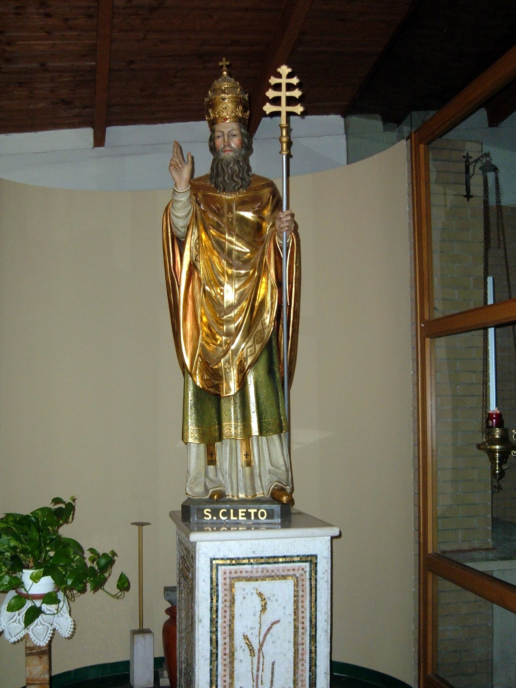 Chiesa di San Cleto, a Roma, nel quartiere San Basilio, in via Bernardino Bernardini. Statua di papa (Ana)Cleto.